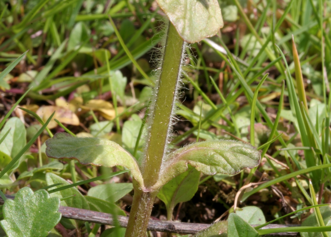 Ajuga reptans